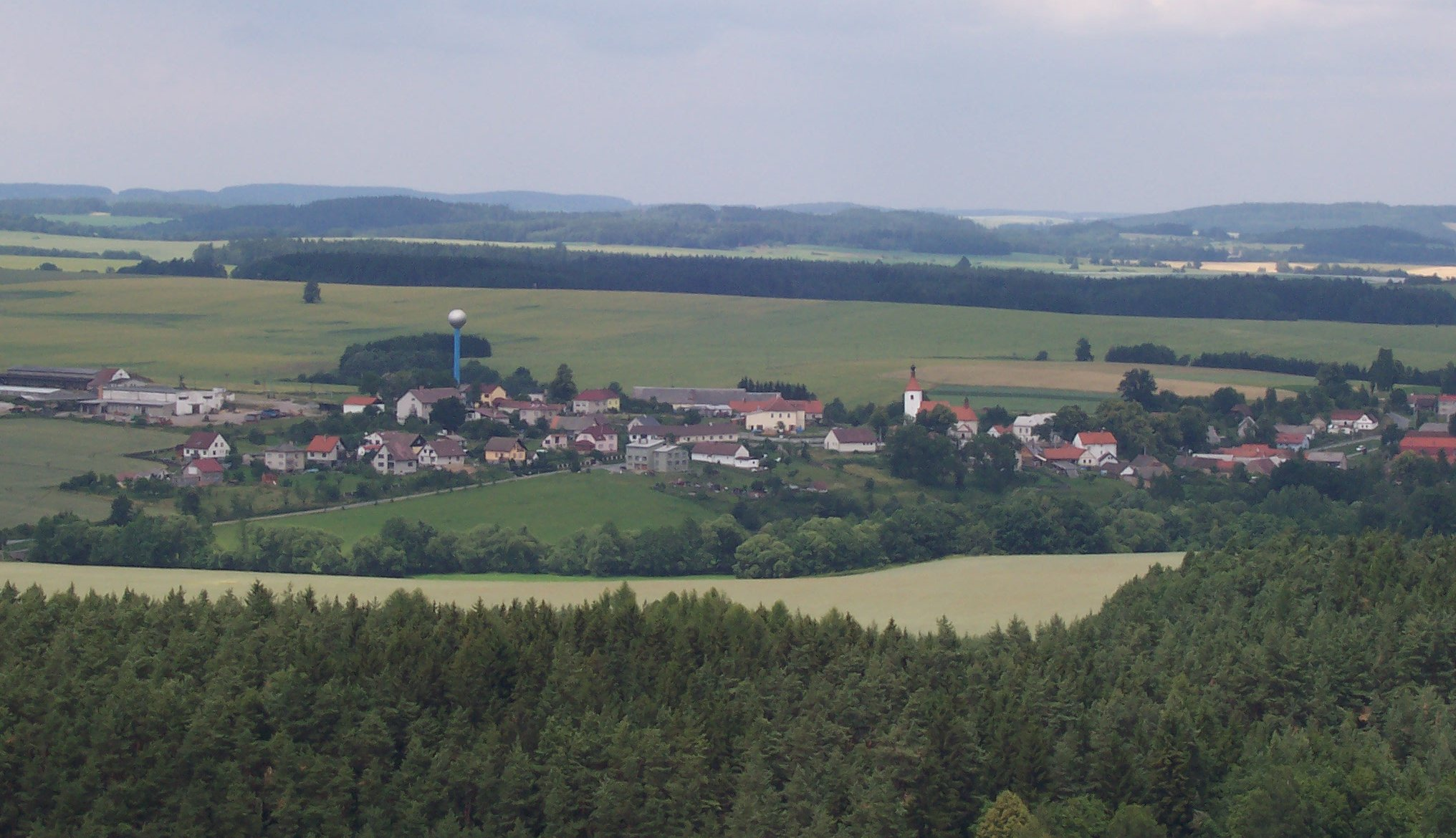 Šebířov, okres Tábor, Česká Republika, pohled z věže hradu Šelmberk (Šebířov, Tábor district, Czech Republic, view from castle tower of Šelmberk)